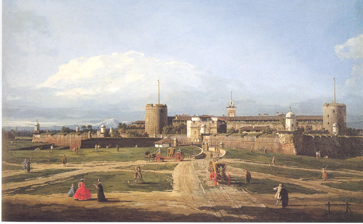 (Italian: Castello Sforzesco)